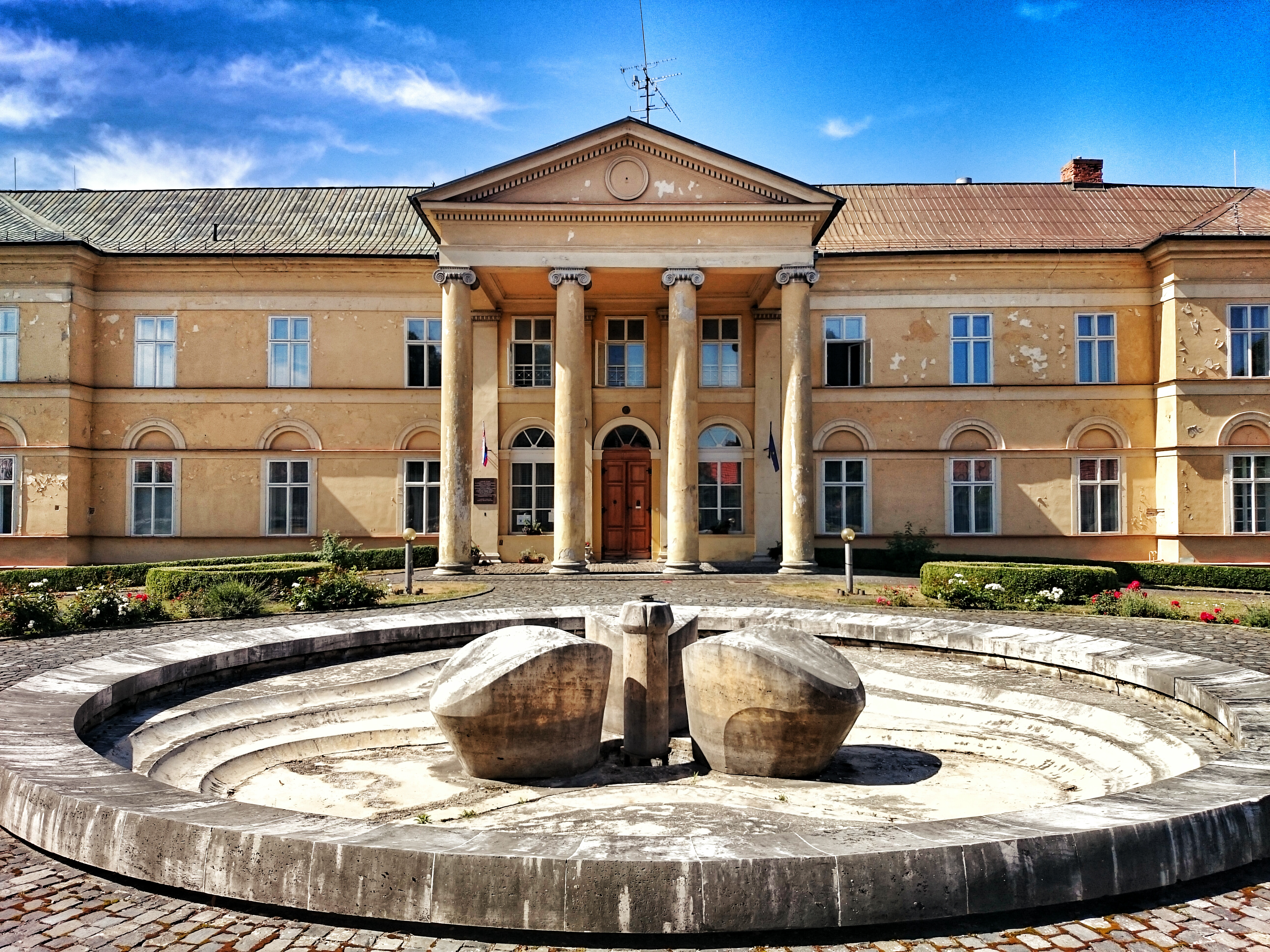 Pohľad na kaštiel z prednej strany. Pred kaštieľom sa nachádza fontána v tvare ruže, ktorá ale nie je pôvodná. Inštalovaná bola v dobe socializmu.